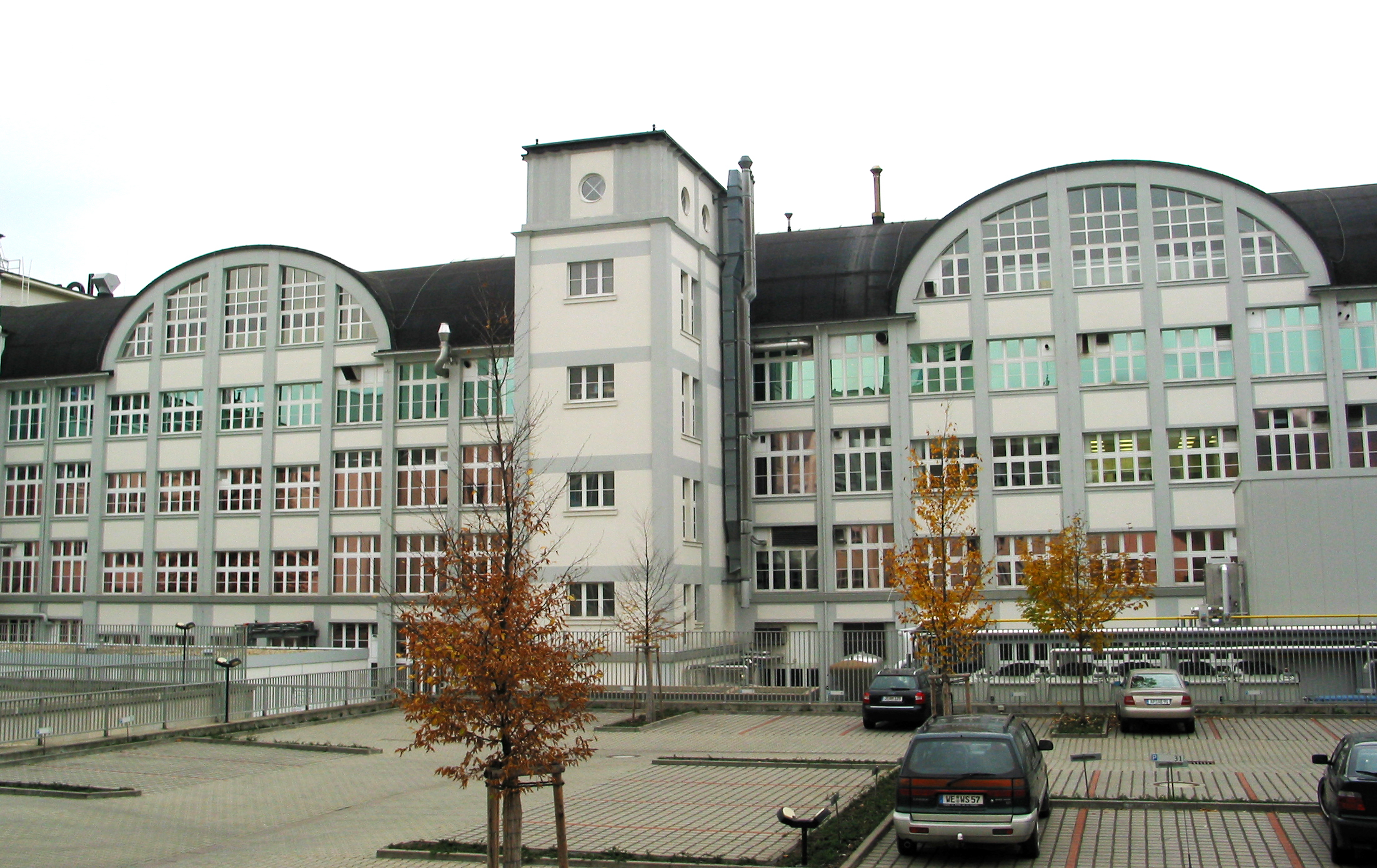 Der Zeiss Bau 23 ist ein Schalenbau aus dem Jahre 1923/24 für die Firma Carl Zeiss. Seine Dachkonstruktion war die erste Zylinderschale der Welt nach dem Zeiss-Dywidag-Patent von Bauersfeld (Carl Zeiss Jena) & Dischinger (Betonfirma Dyckerhof & Widmann). Nach dem gleichen Schalenbauprinzip wurde die Kuppelschale des Jenaer Planetariums 1926 errichtet. Seit 1947 nutzt das Pharmaunternehmen Jenapharm GmbH & Co. KG das Gebäude, welches heute unter Denkmalschutz steht.